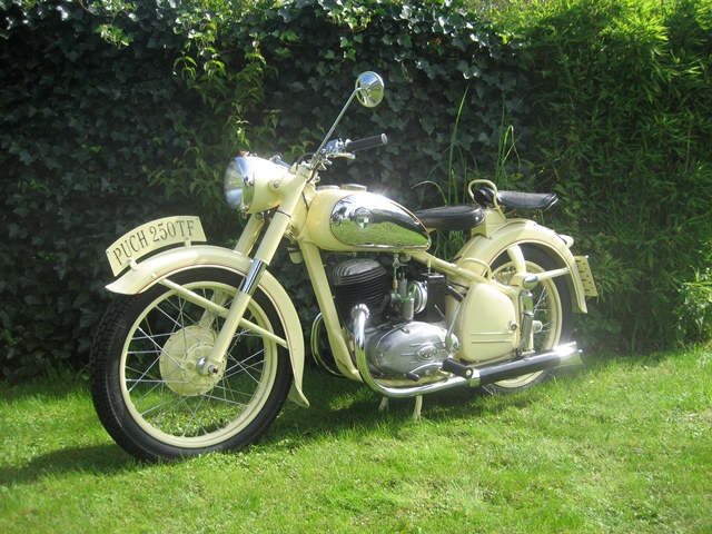 Puch TF250 - Baujahr 1951